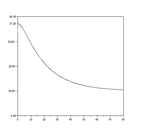 Exemple d'évolution de la température après la mort. Courbe créée avec Scilab. Selon une expression donnée par le docteur Henssge.